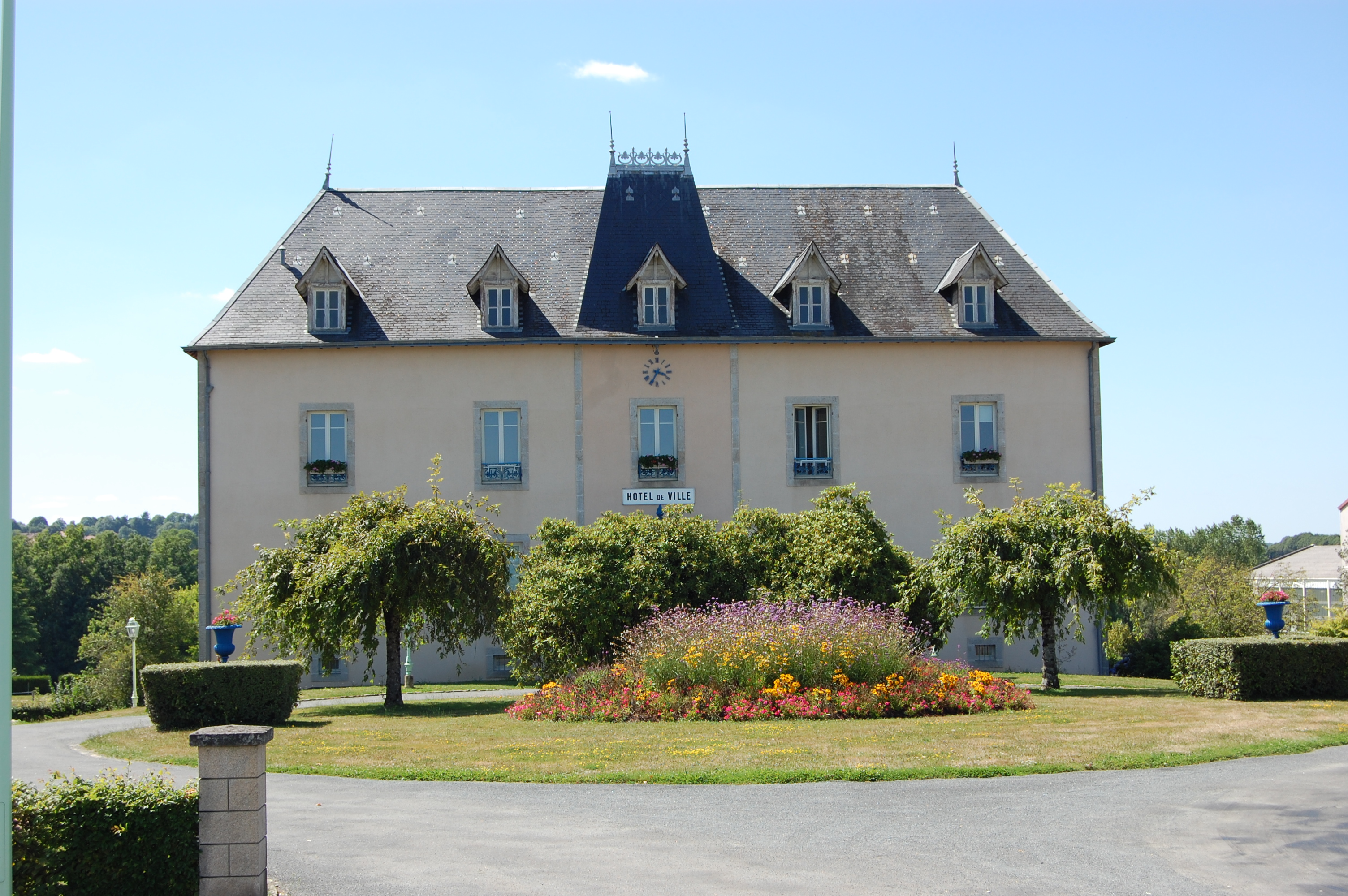 Hôtel de Ville de Châlus (Haute-Vienne, France)